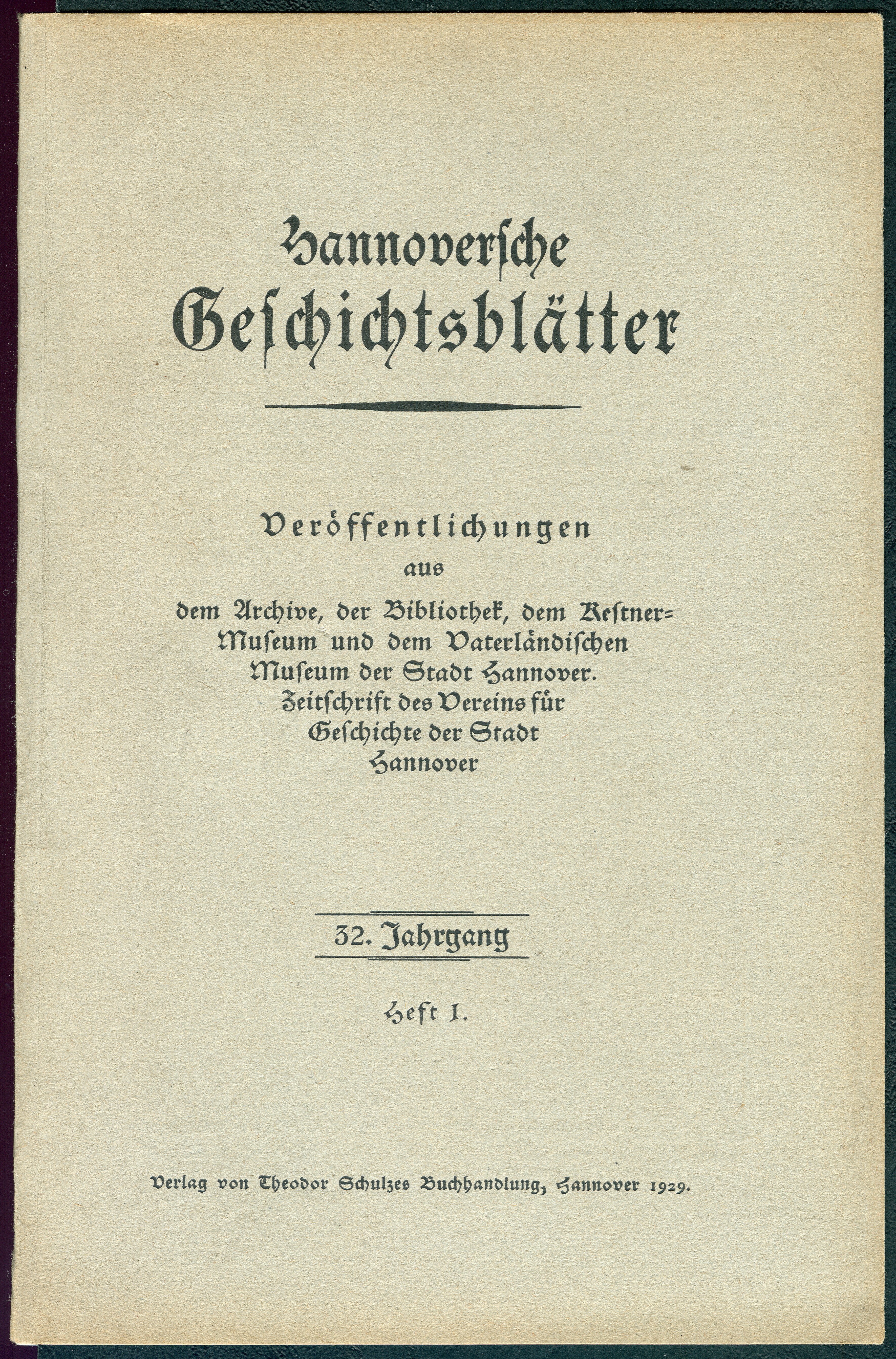 Umschlagdeckel vorne Aussenseite mit dem Aufdruck „Hannoversche Geschichtsblätter. Veröffentlichungen aus dem Archive, der Bibliothek, dem Kestner-Museum und dem Vaterländischen Museum der Stadt Hannover. Zeitschrift des Vereins für Geschichte der Stadt Hannover“ Das Heft 1. des 32. Jahrgangs erschien laut Aufdruck im „Verlag von Theodor Schulzes Buchhandlung“ in Hannover im Jahr 1929 ...